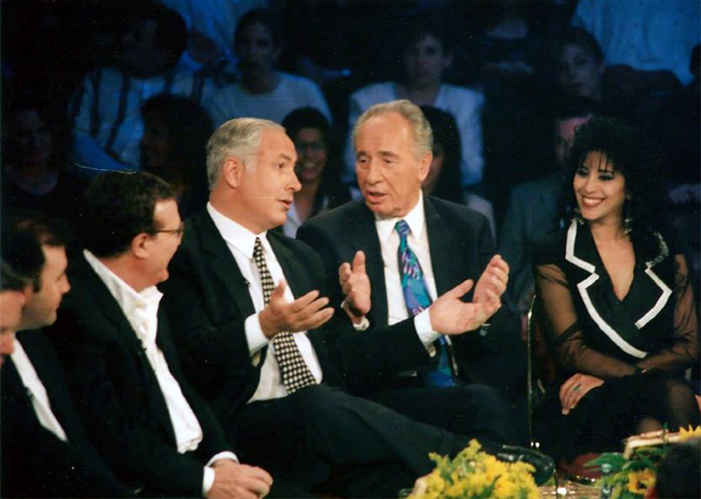 עופרה חזה שמעון פרס ביבי נתניהו ויהורם גאון, תכנית מיוחדת של "המעגל" בהנחיית דן שילון ליום העצמאות ה-47 למדינת ישראל, ערוץ 2 .